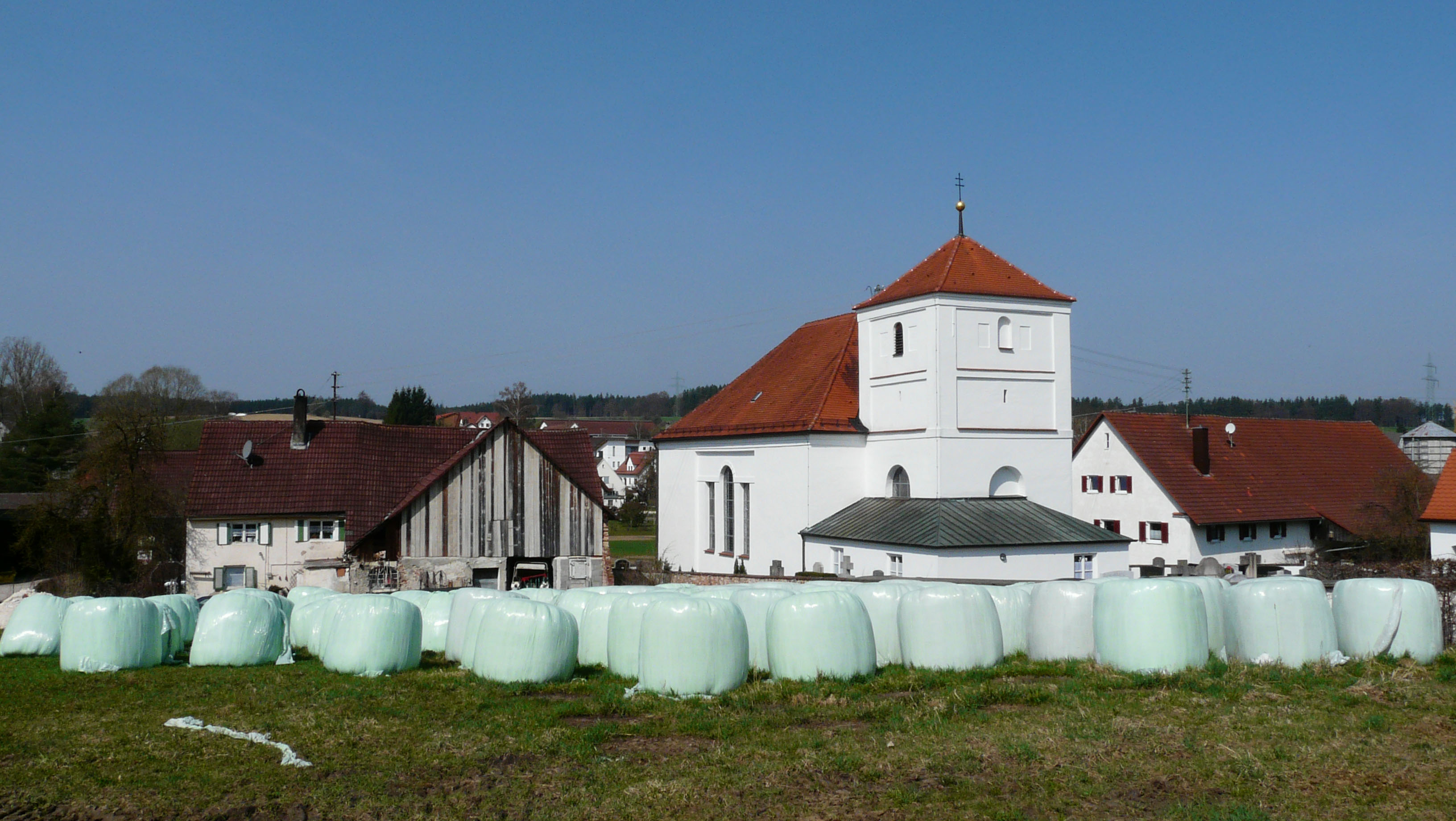 Kirche in Waldberg, Bobingen